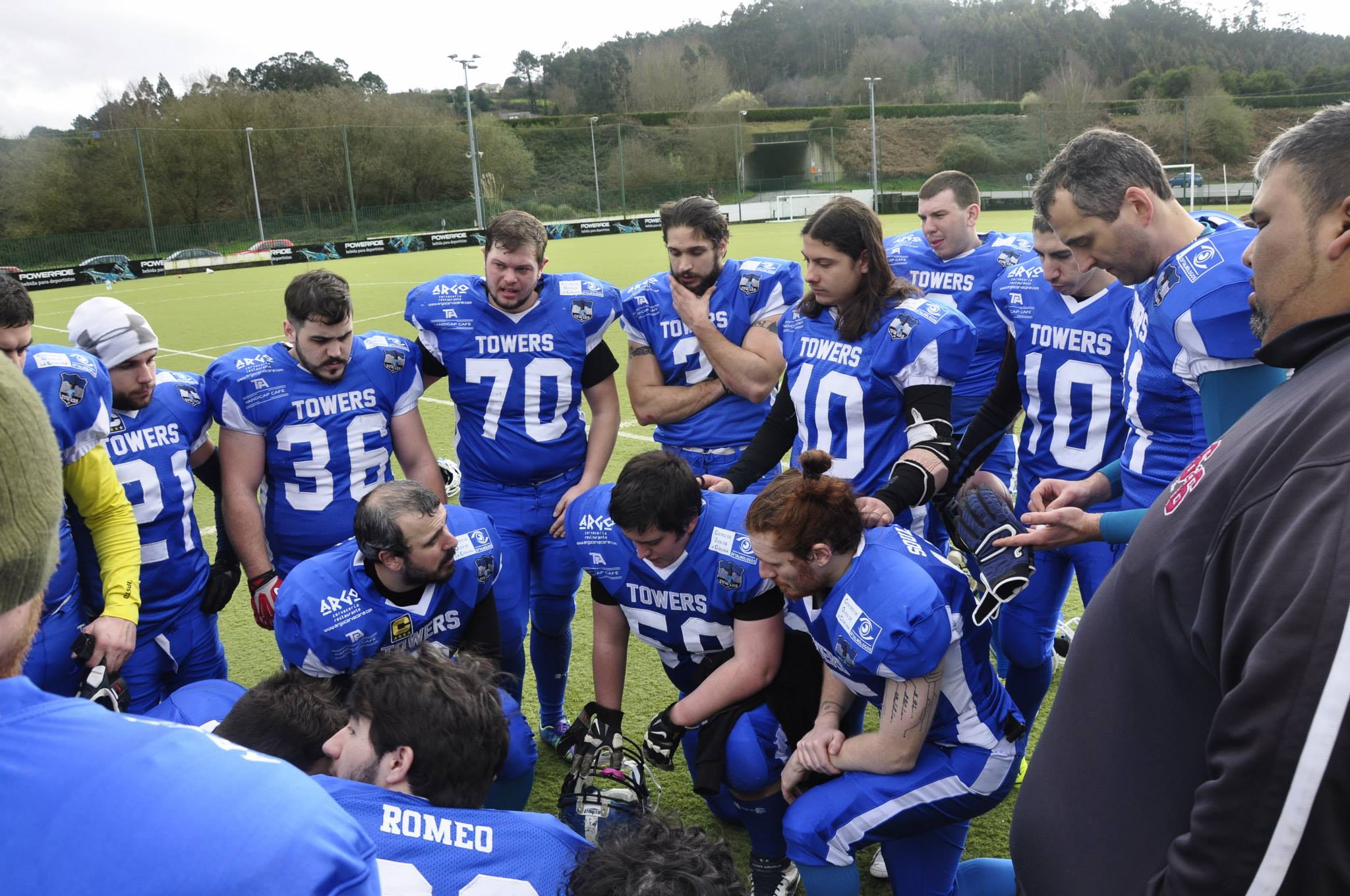 Huddel post-partido